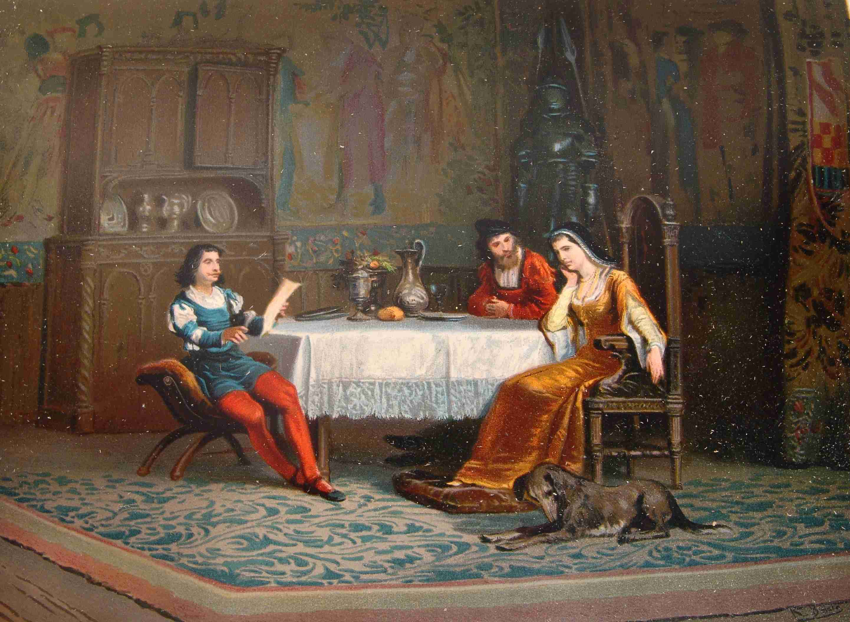 202_087_quijote_cap34